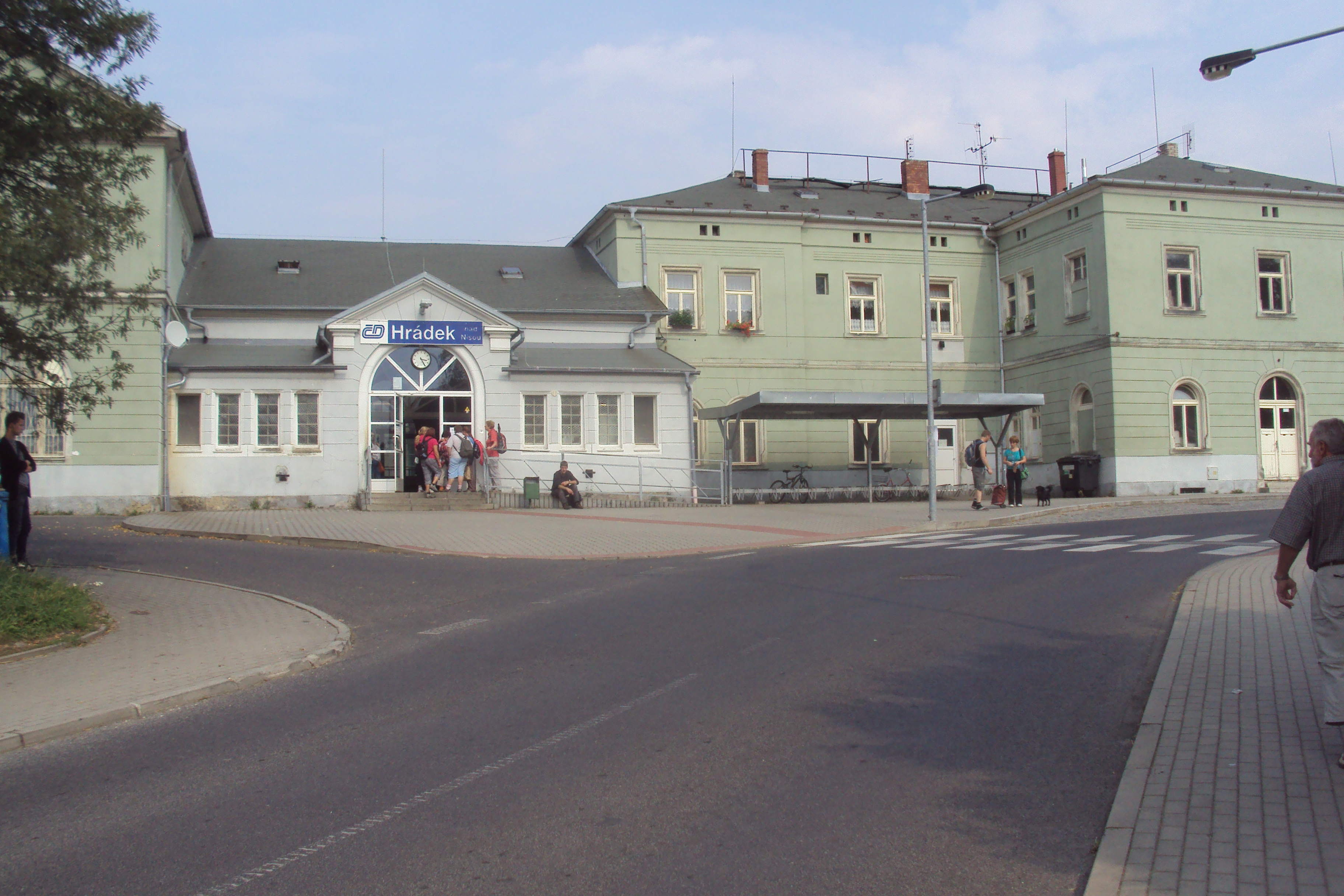 Česky: Nádraží vně